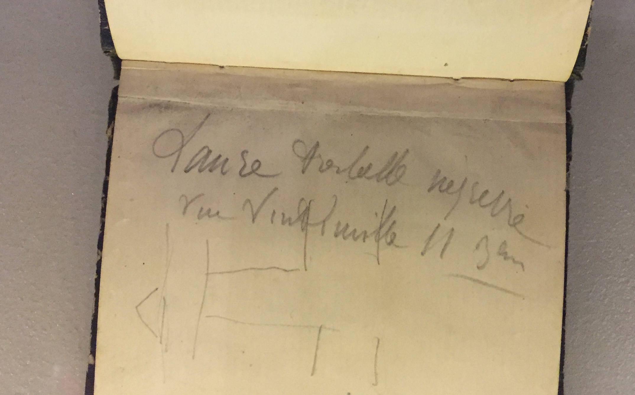 Carnet de notes du peintre français douard Manet avec une mention sur le modèle Laure, la servante noire représentée sur le tableau Olympia. Ce carnet détenu par la Morgan Libary and museum de New York indique le nom et l'adresse de la modèle (11 rue de Vintimille), restés inconnus jusqu'en 2018. Le carnet est montré à l'exposition temporaire "Le Modèle noir" au Musée d'Orsay en 2019.